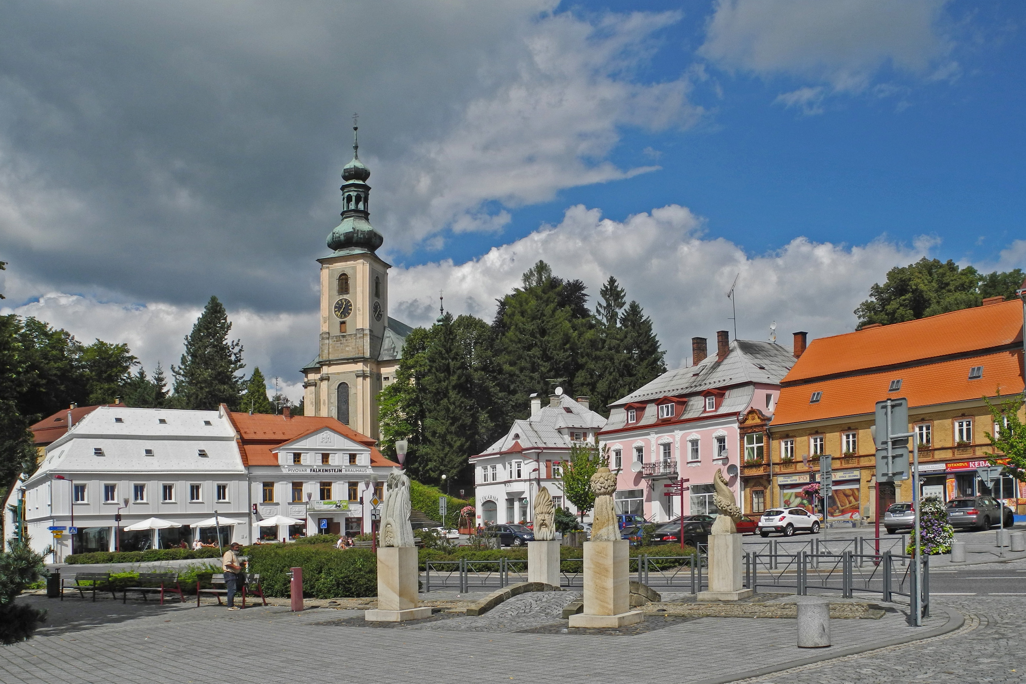 Maria-Magdalenen-Kirche und Häuser auf dem Marktplatz in Schönlinde (Krásná Lípa, Křinické náměstí)